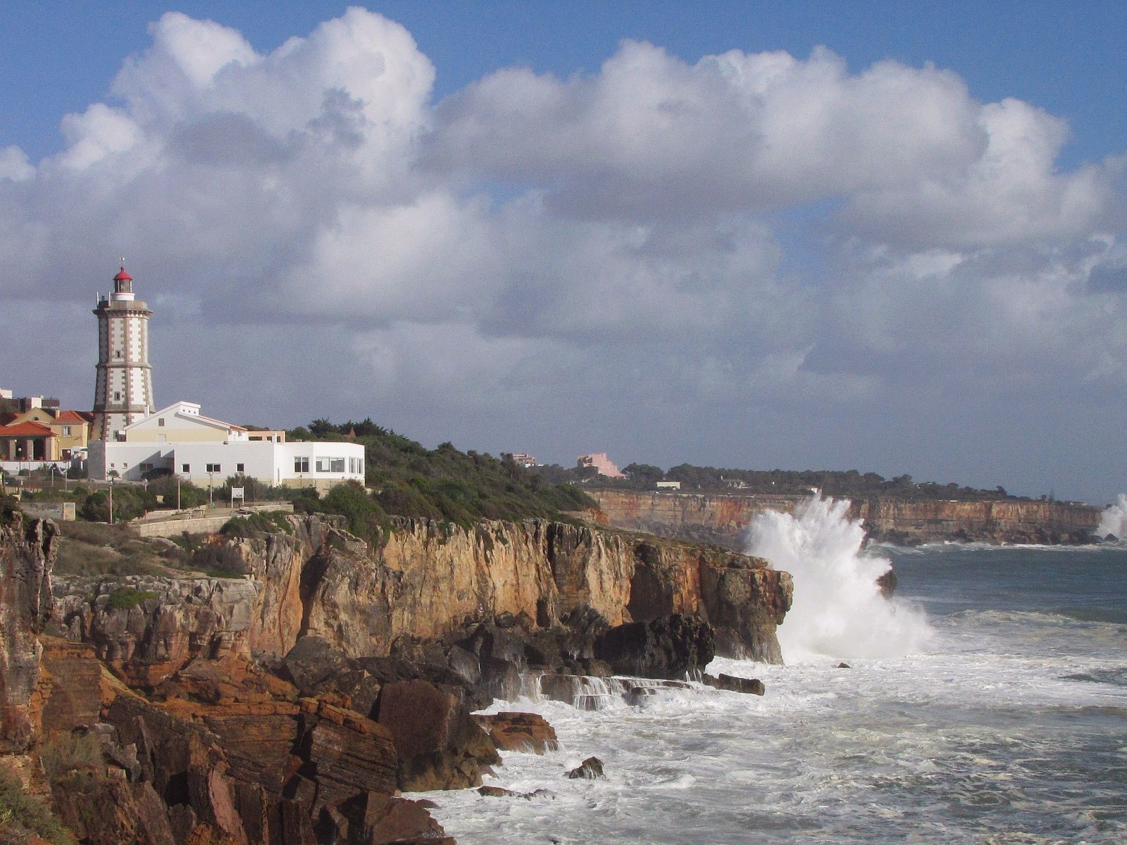 Leuchtturm Farol de Guia Cascais Costa do Estoril Lisboa Portugal Foto Wolfgang Pehlemann IMG_8868